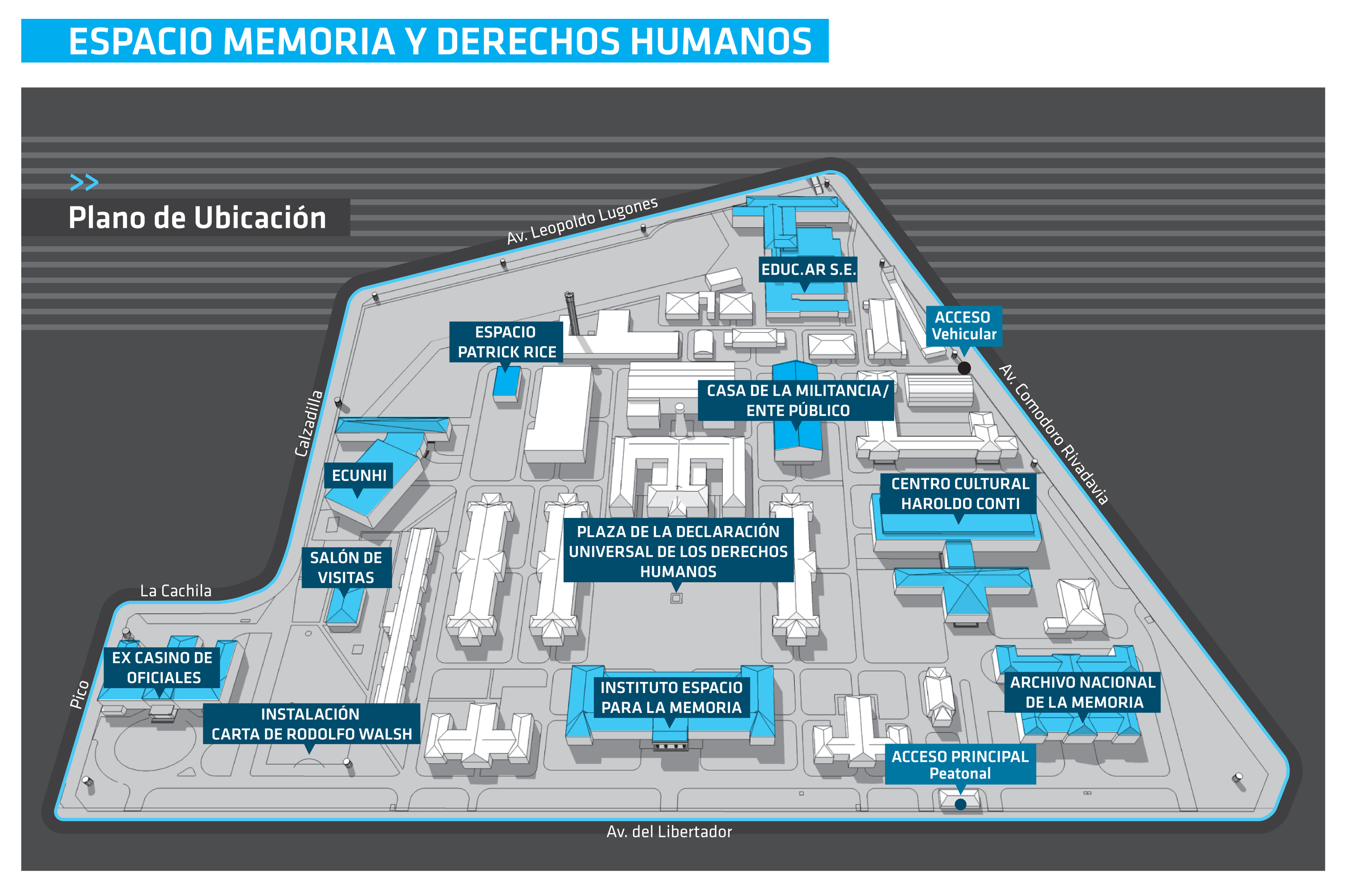 Plano del Escuela de Mecánica de la Armada, actual Espacio Memoria y Derechos Humanos, Buenos Aires, Argentina.